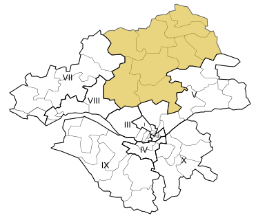 Carte de la sixième circonscription de la Loire-Atlantique